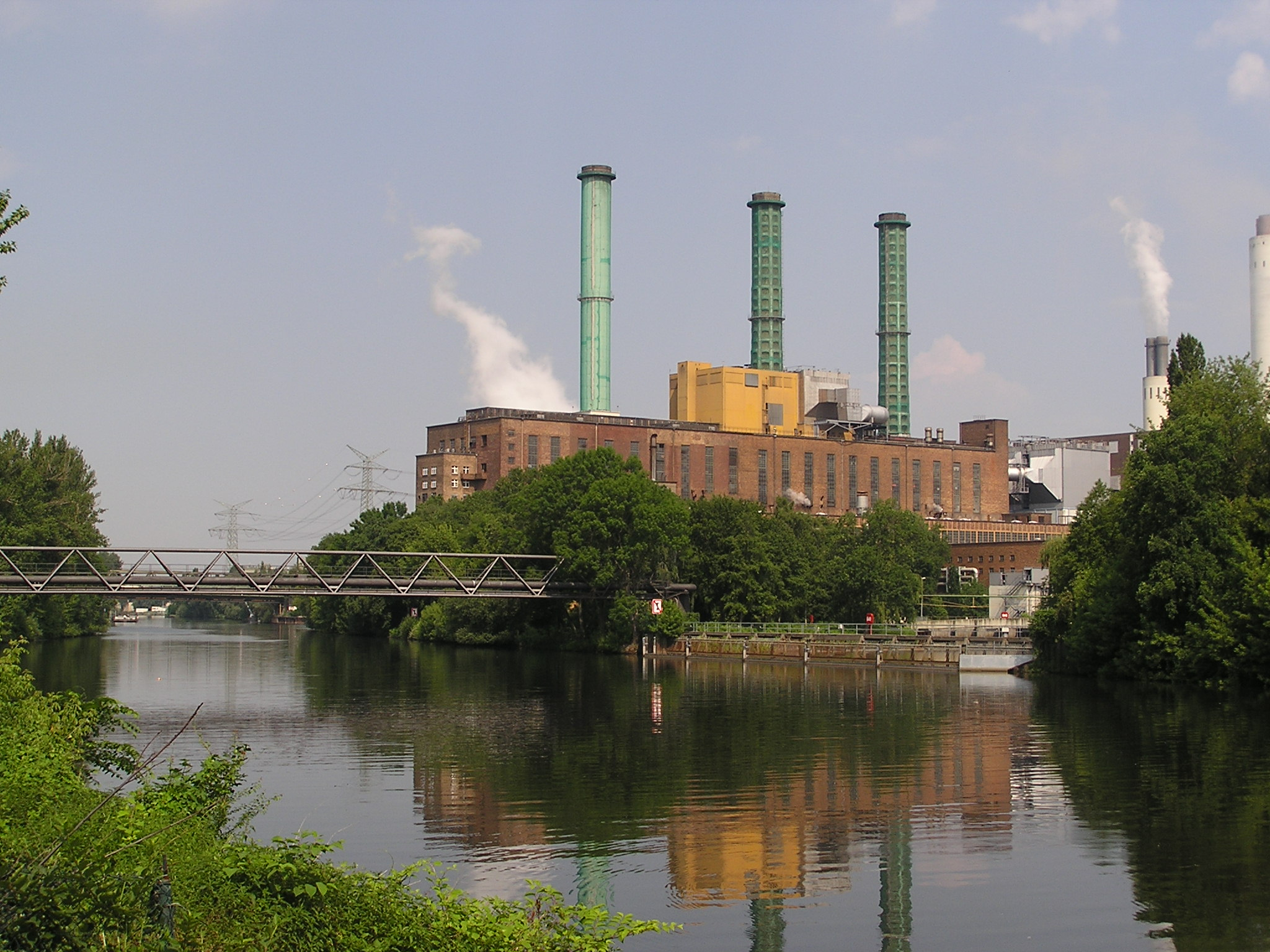 Berlin, Heizkraftwerk Reuter